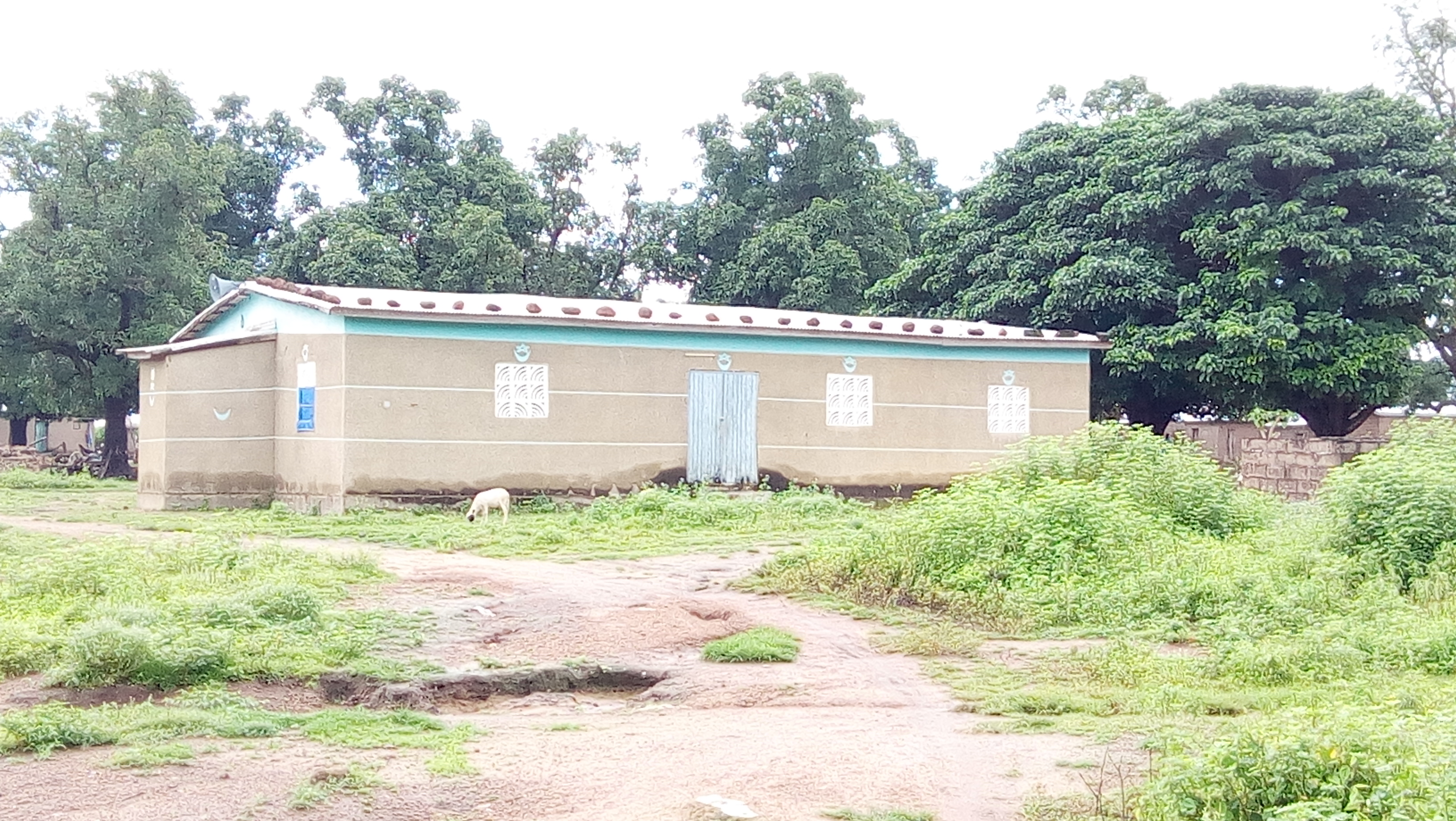 La grande mosquée de Ziasso est située dans le quartier Noumousso